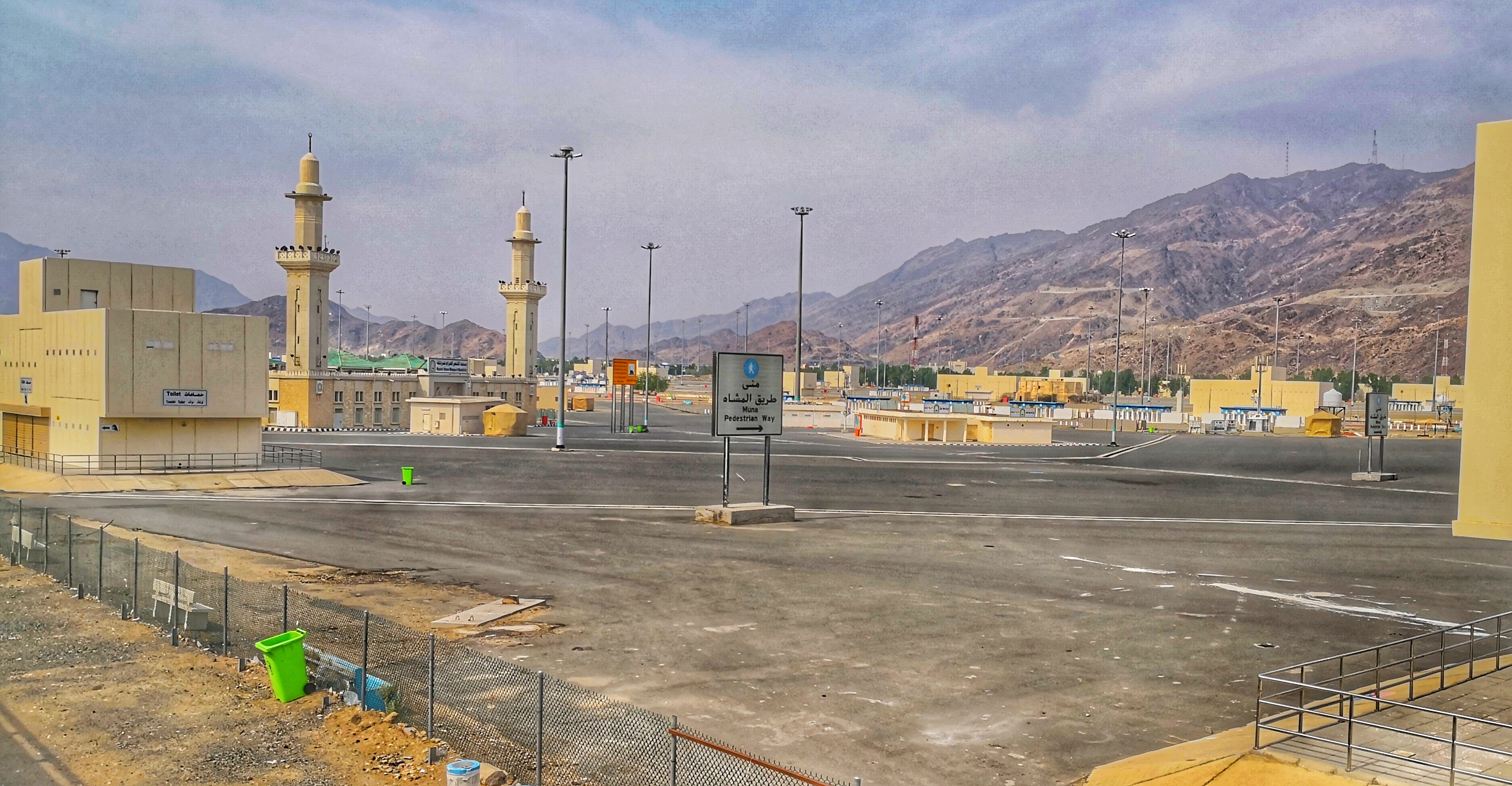 جانب من مشعر مزدلفة بمكة المكرمة